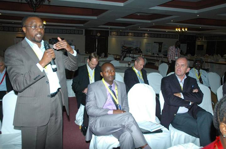 Jabulani Dhliwayo addressing a summit in Tanzania